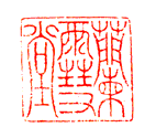 何震蘭雪堂印。